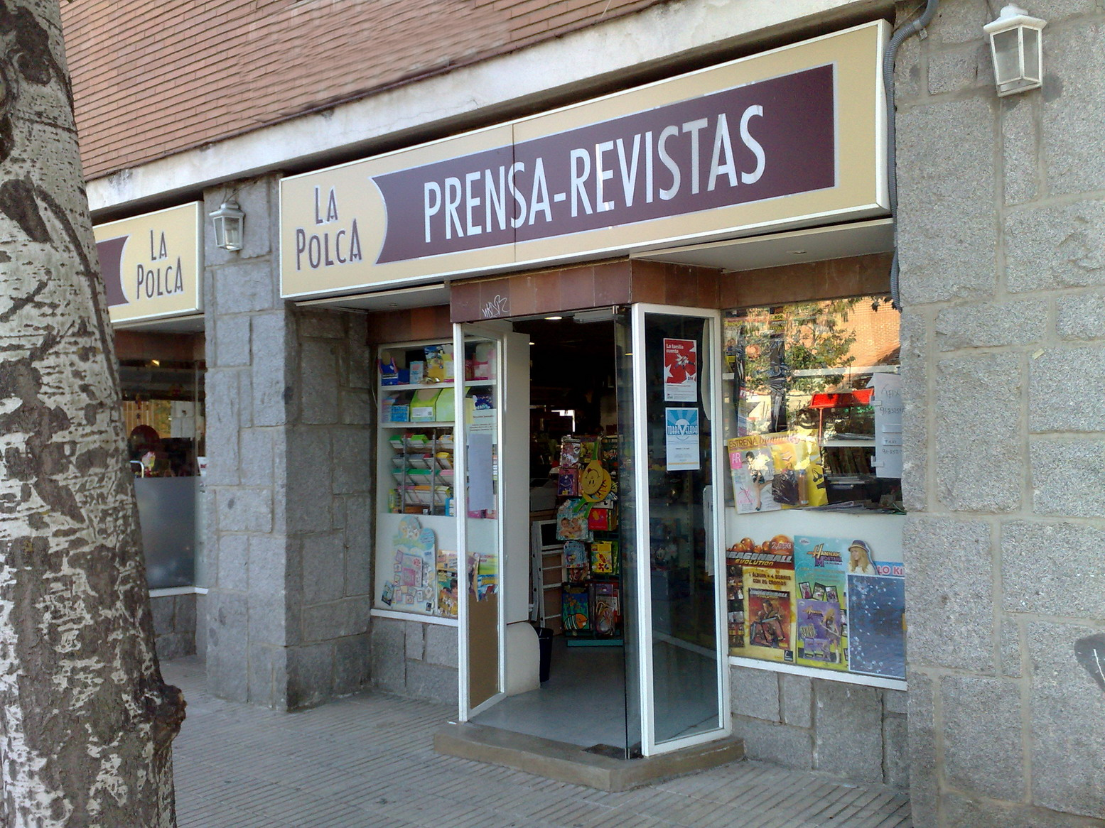 Torrelodones. Venta de prensa.